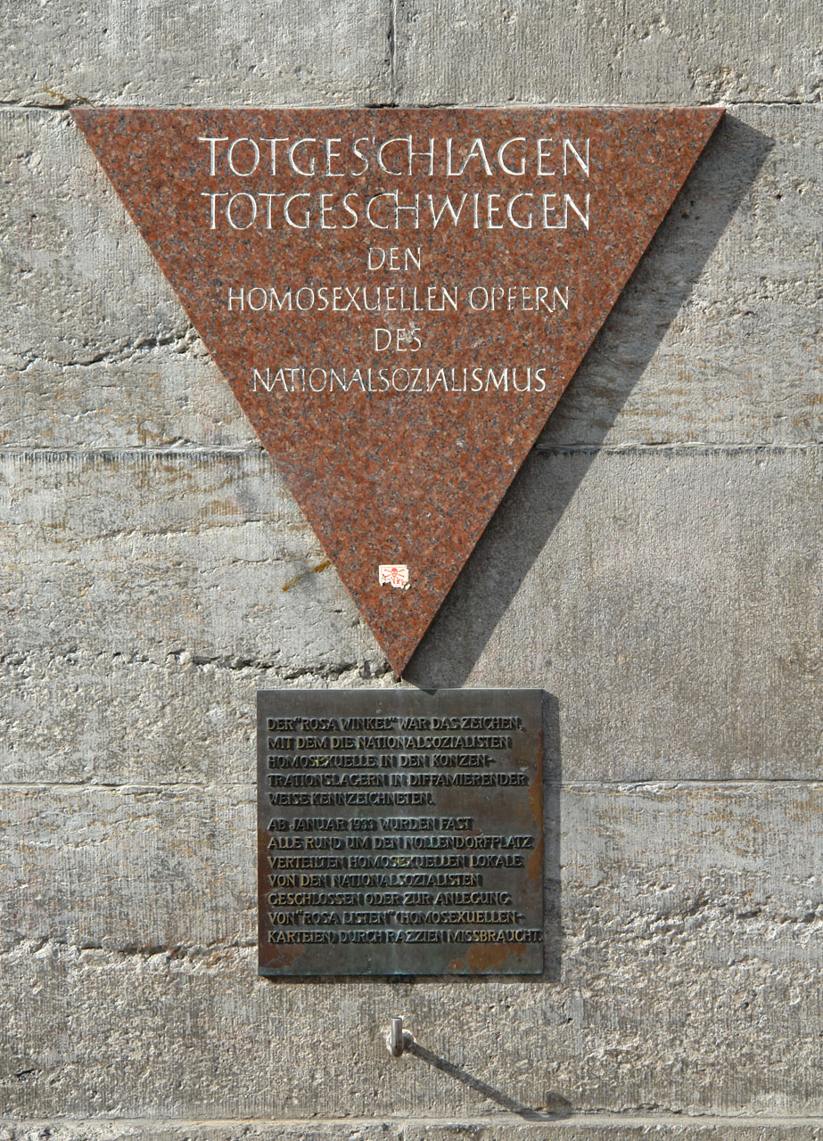 Gedenkstein »Rosa Winkel« an der Wand des U-Bahnhofs Nollendorfplatz in Berlin. Inschrift: TOTGESCHLAGEN TOTGESCHWIEGEN DEN HOMOSEXUELLEN OPFERN DES NATIONALSOZIALISMUS Erläuterungstafel: Der »rosa Winkel« war das Zeichen, mit dem die Nationalsozialisten Homosexuelle in den Konzentrationslagern in diffamierender Weise kennzeichneten. Ab Januar 1933 wurden fast alle rund um den Nollendorfplatz verteilten homosexuellen Lokale von den Nationalsozialisten geschlossen oder zur Anlegung von »rosa Listen« (Homosexuellen-Karteien) durch Razzien missbraucht Initiatoren: AHA (Allgemeine Homosexuelle Arbeitsgemeinschaft) und HuK Berlin